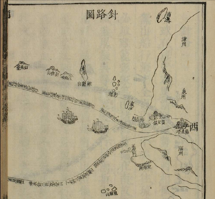 《中山传信录》卷一 《针路图》 显示福建往琉球路径。